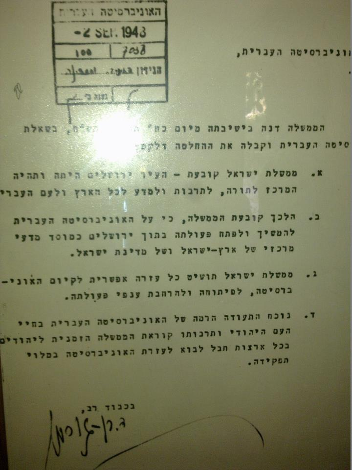 מכתבו של דוד בן גוריון לאוניברסיטה העברית בייסודה